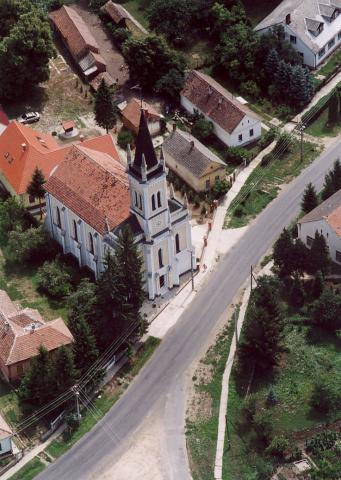 Gyékényes, Hungary, aerialphotography